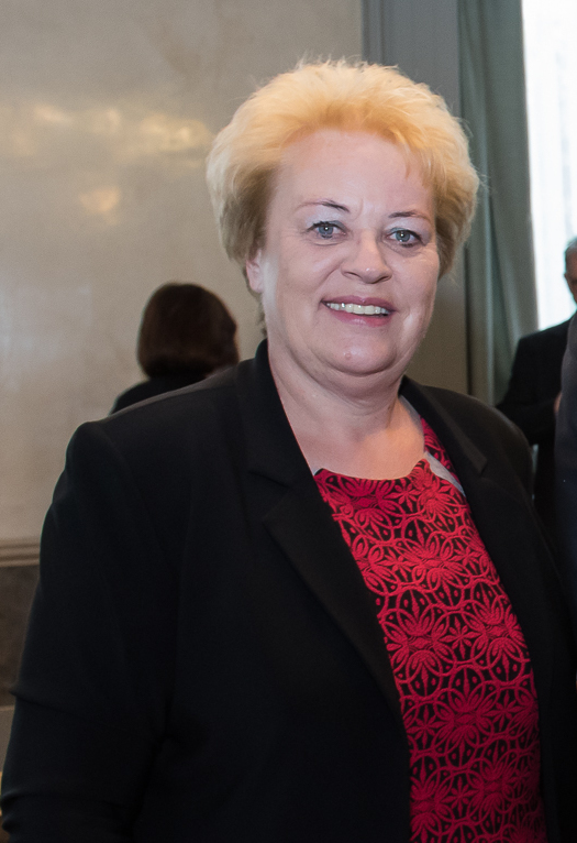 Verena Dunst vor der SPÖ-Präsidiumssitzung am 17.5.2016